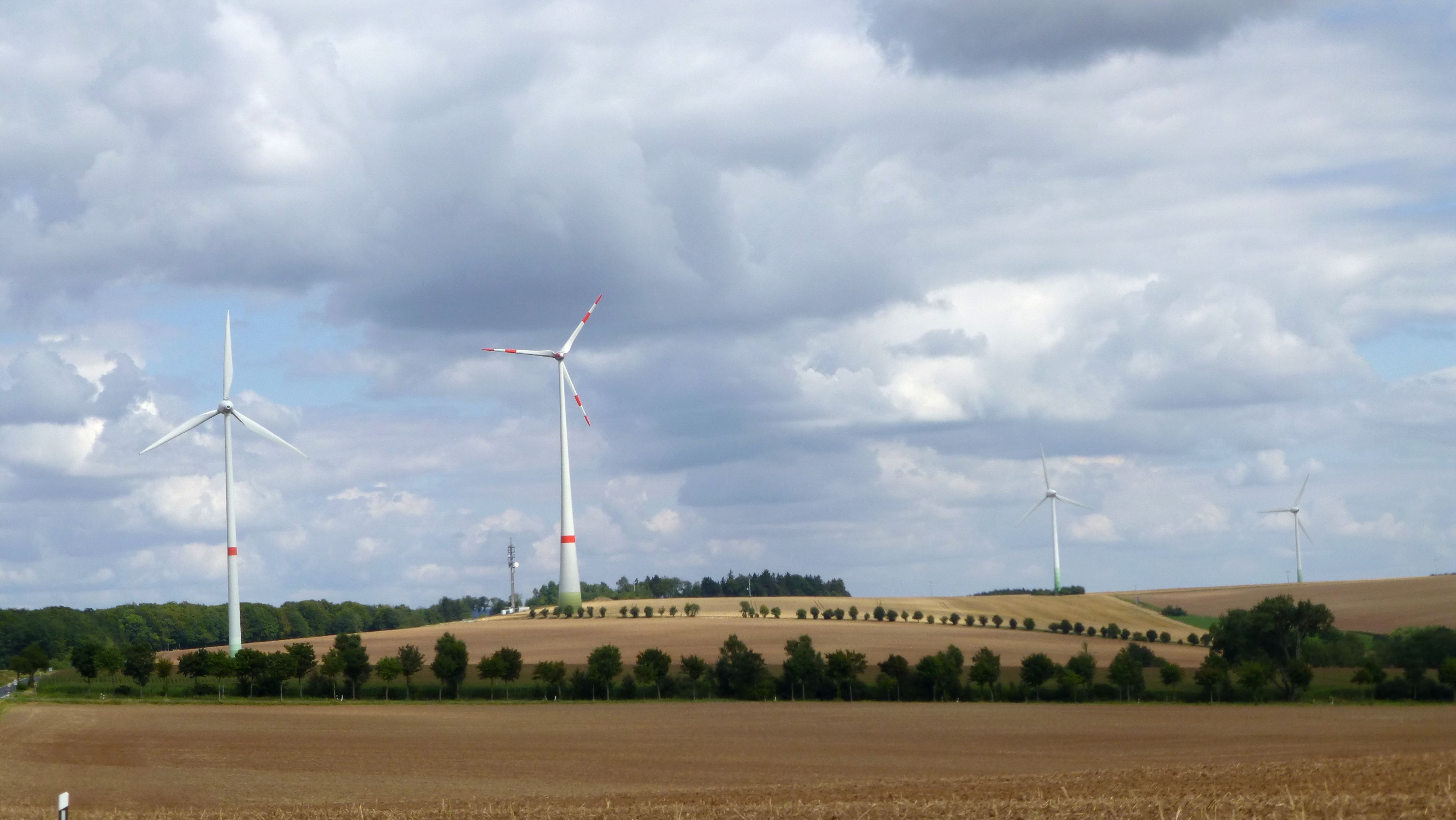 Auf dem Roten Berg mit Windrädern